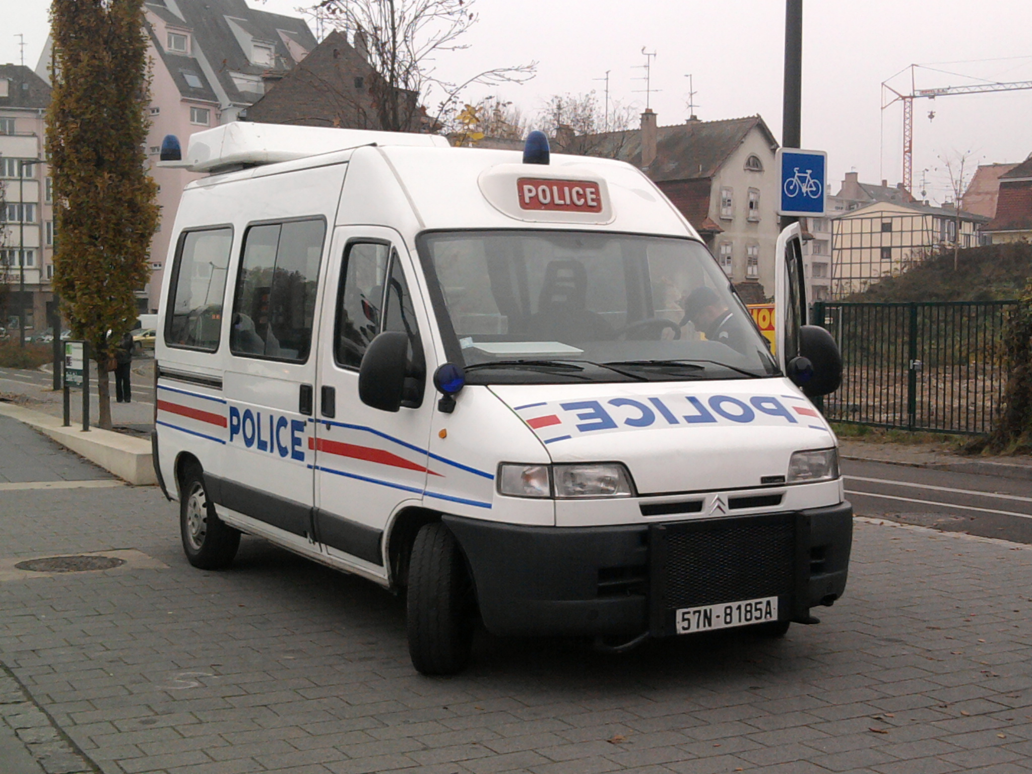 Citroën Jumper de la Police nationale, ancienne sérigraphie. Strasbourg - 2011